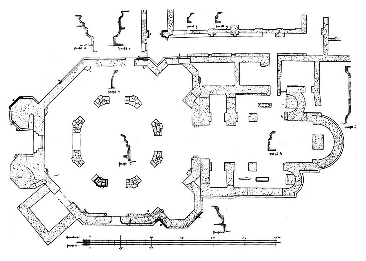 Grundriss der Stiftskirche St. Georg zu Goslar anhand der Ausgrabungsergebnisse von 1875/76